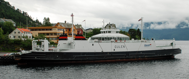 MF Gulen i Lavik i 2010